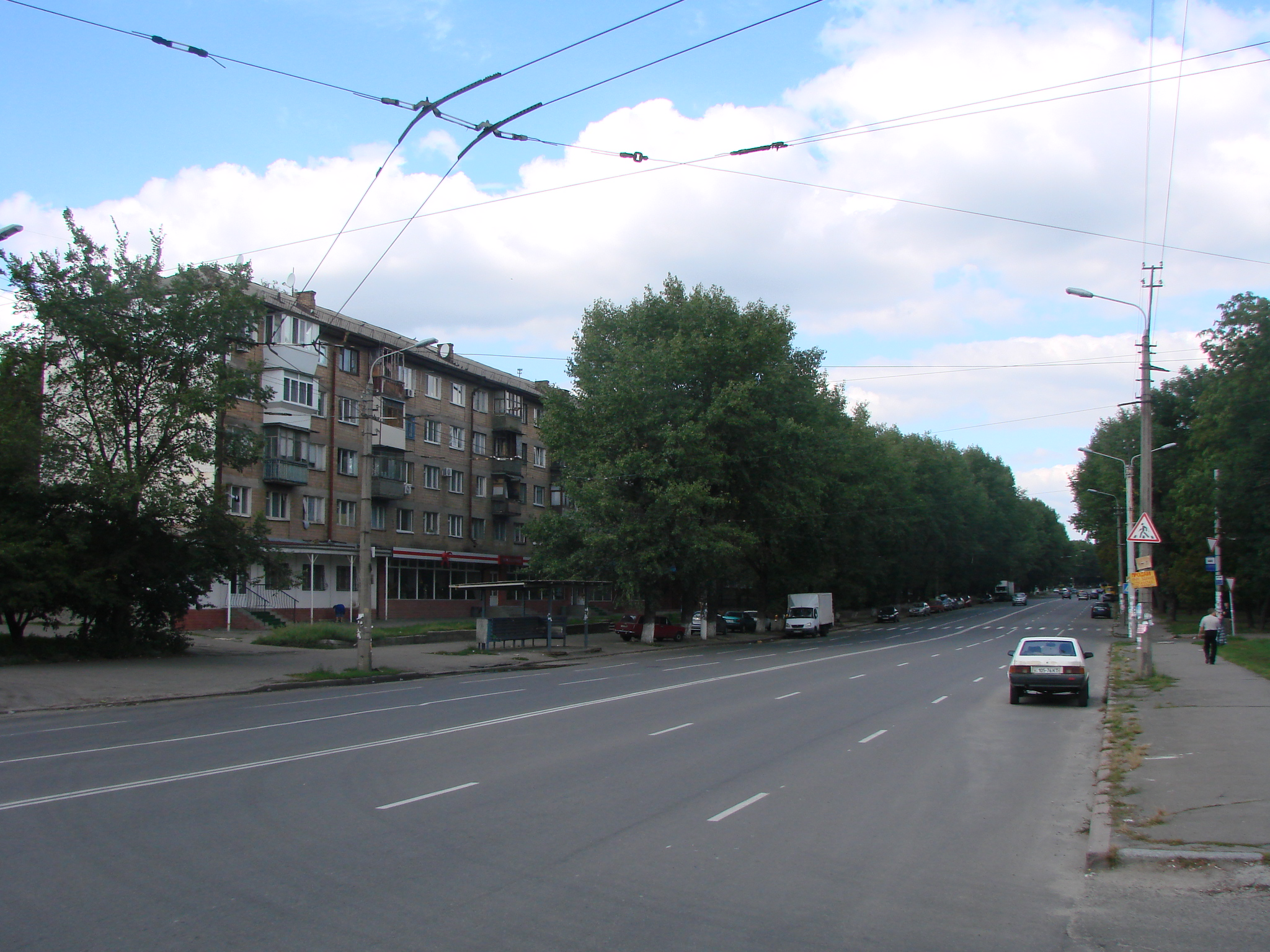 Відрадний проспект у Києві